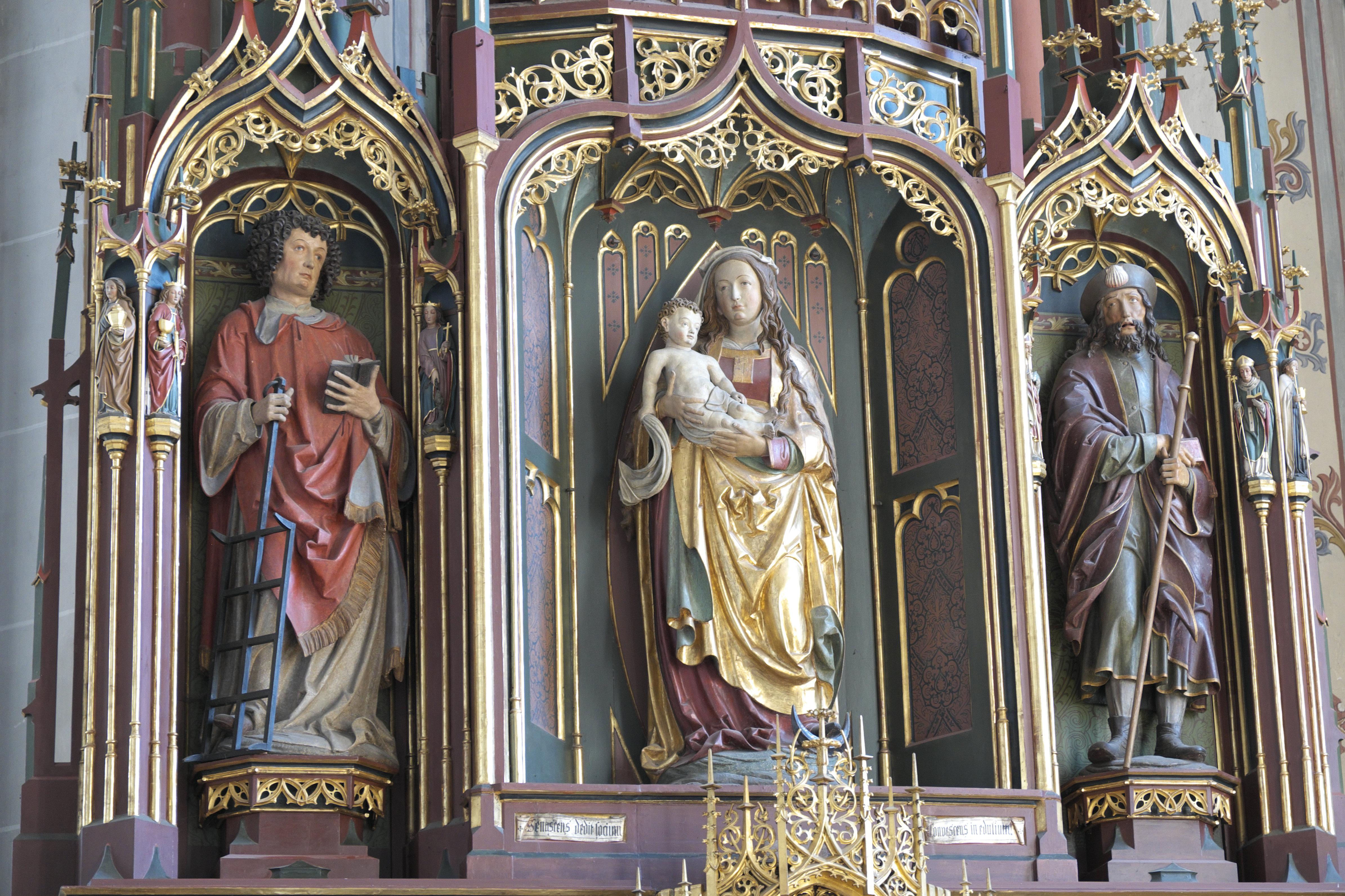 Katholische Pfarrkirche St. Laurentius in Obing im Landkreis Traunstein (Bayern/Deutschland), neugotischer Hochaltar mit Schnitzfiguren (heiliger Laurentius, Madonna mit Kind, heiliger Jakobus der Ältere, um 1515/20) des Meisters von Rabenden